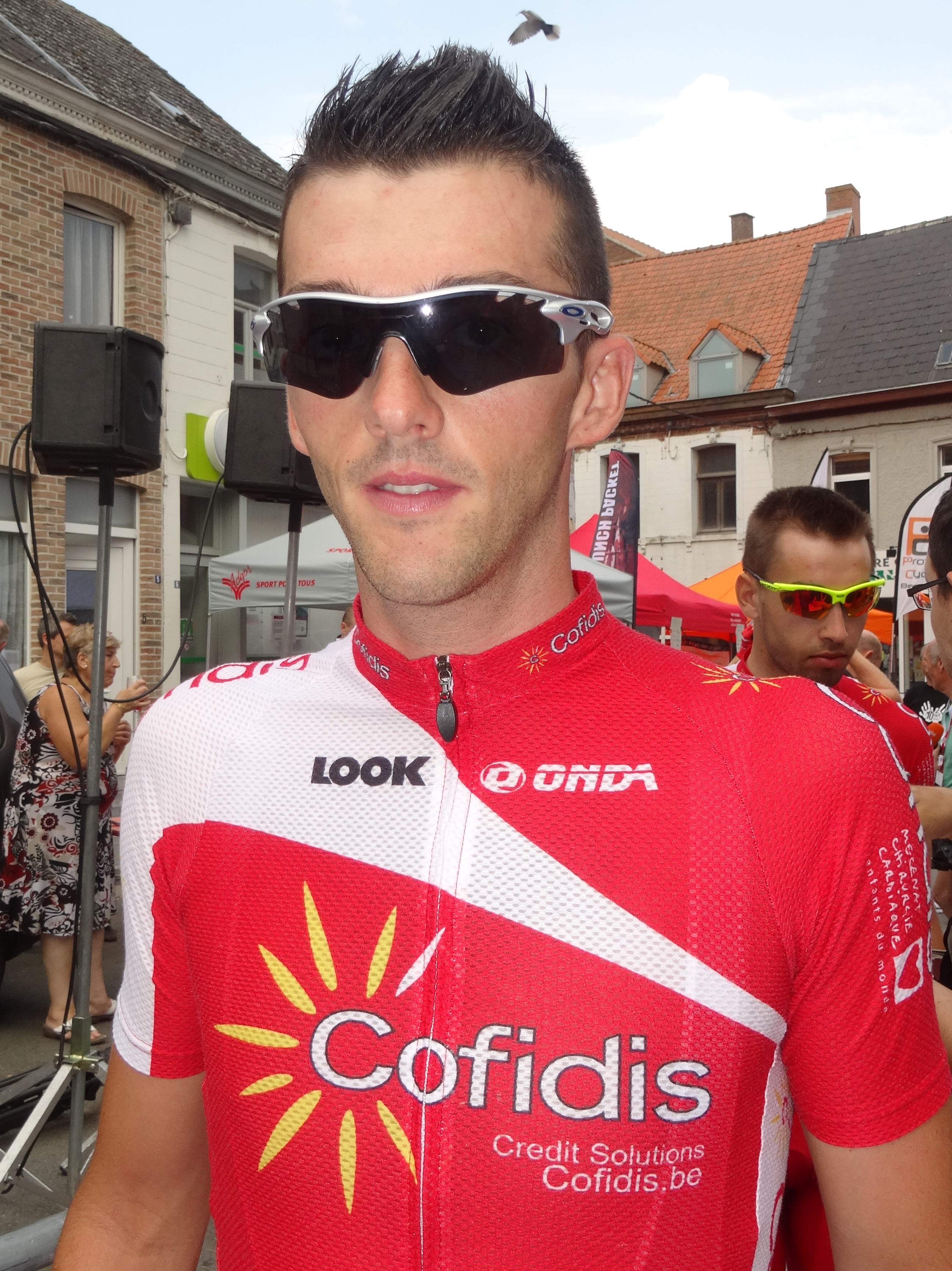 Reportage photographique réalisé le samedi 26 juillet à l'occasion du départ de la première étape du Tour de Wallonie 2014 à Frasnes-lez-Anvaing, Belgique.